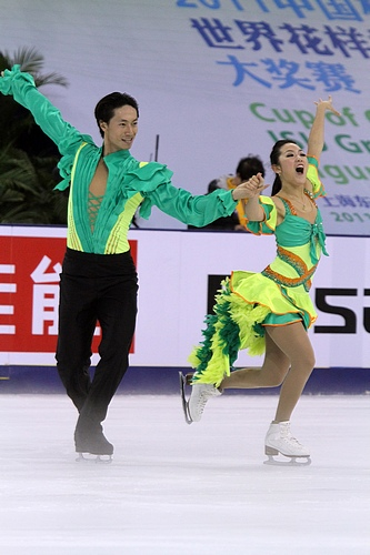 Юй Сяоян и Ван Чэнь на Кубке Китая 2011